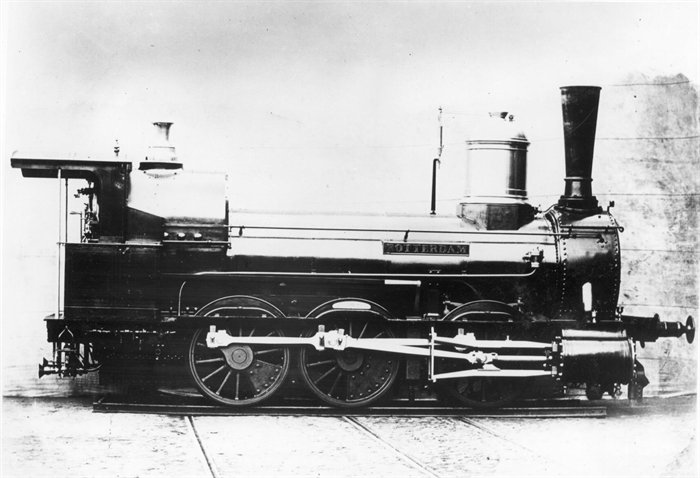 Stoomlocomotief "Rotterdam" van de A.R. (Société Anonyme des Chemins de Fer d'Anvers à Rotterdam)